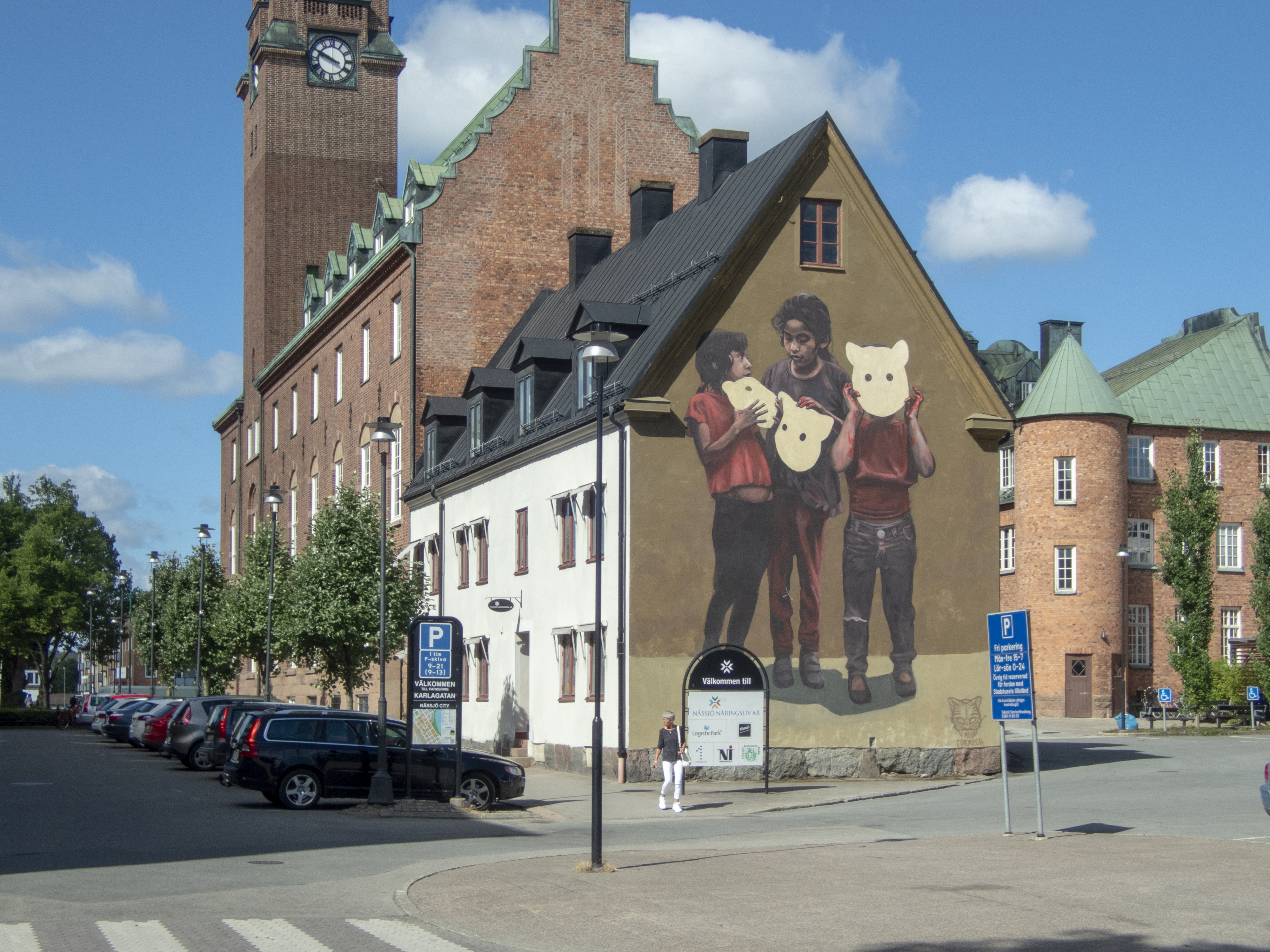 Väggmålning av Milu Correch (2016) i Nässjö